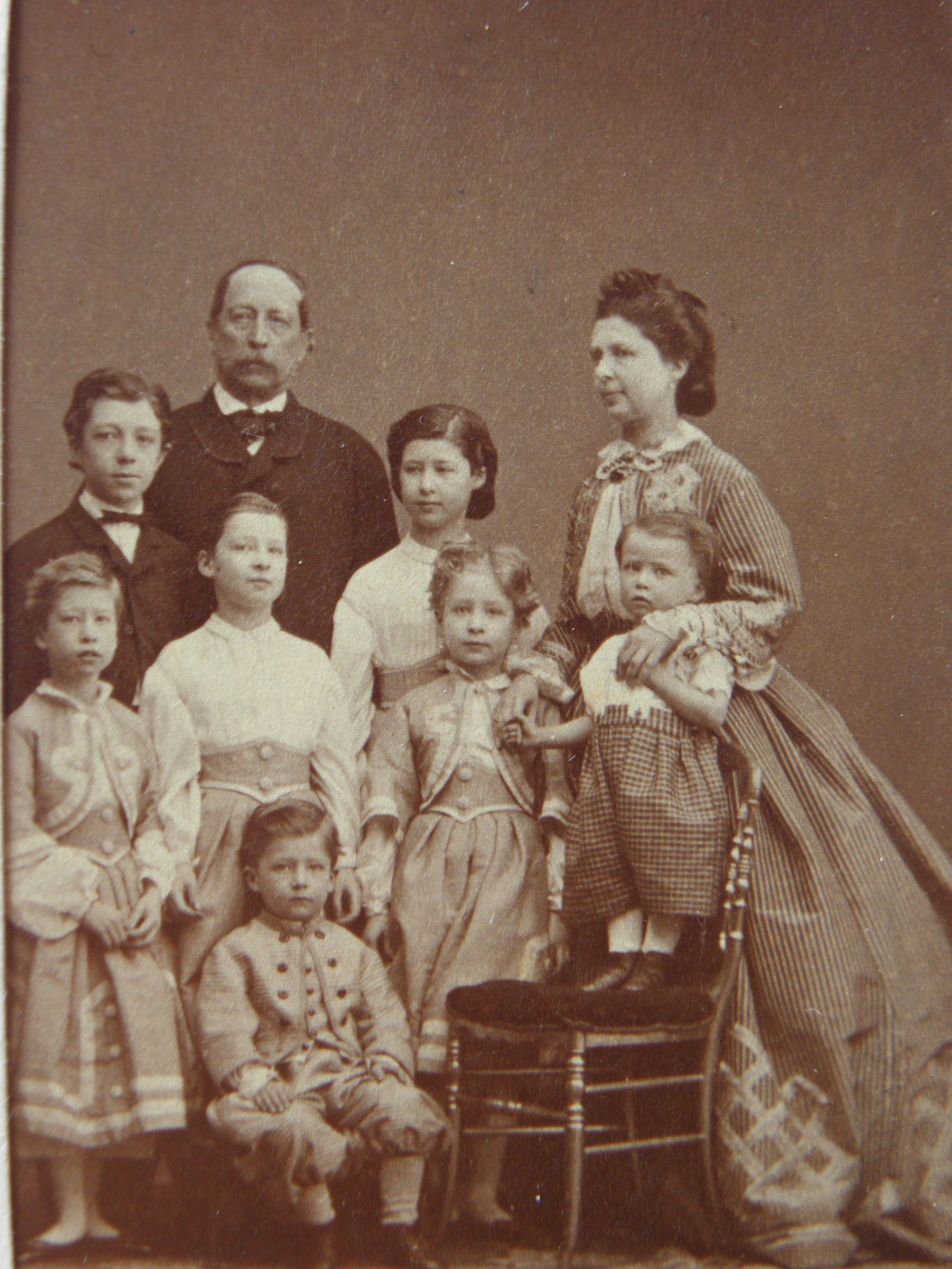 Lobkowicz Zdenka (roz.Lobkowicz,1828-1917) a Josef (1803-75) s dětmi